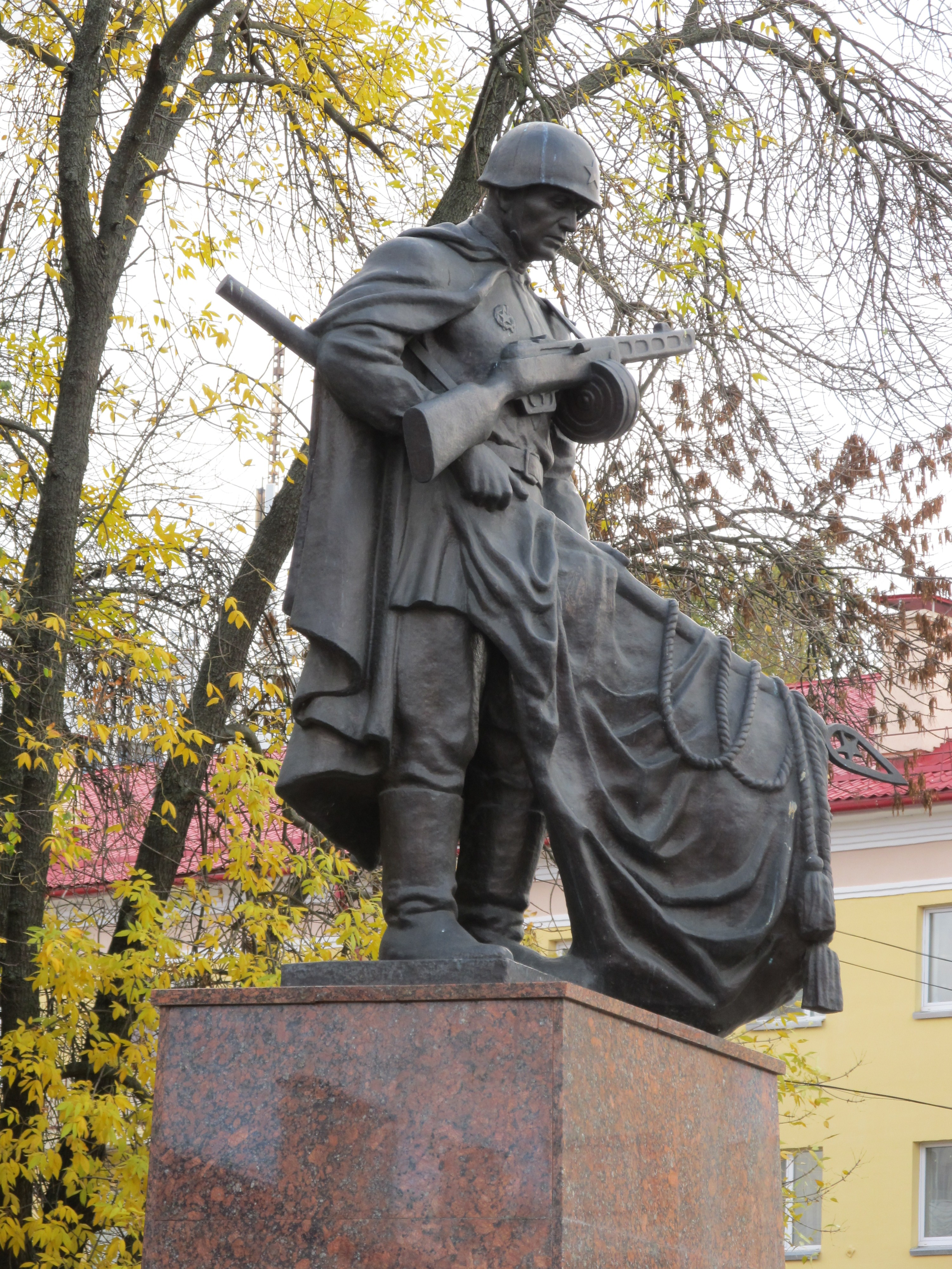 Беларуская (тарашкевіца): Братэрская магіла. г. Гомель This is a photo of Belarusian heritage monument. Reference number: 313Д000062 ( WLM)